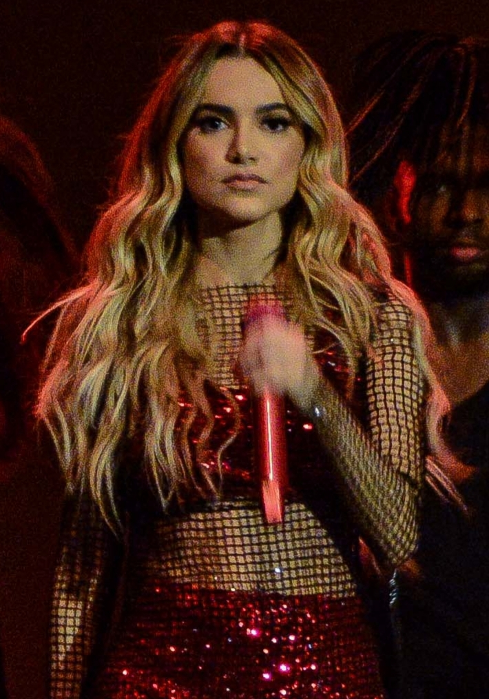 Manu Gavassi no Tom Brasil